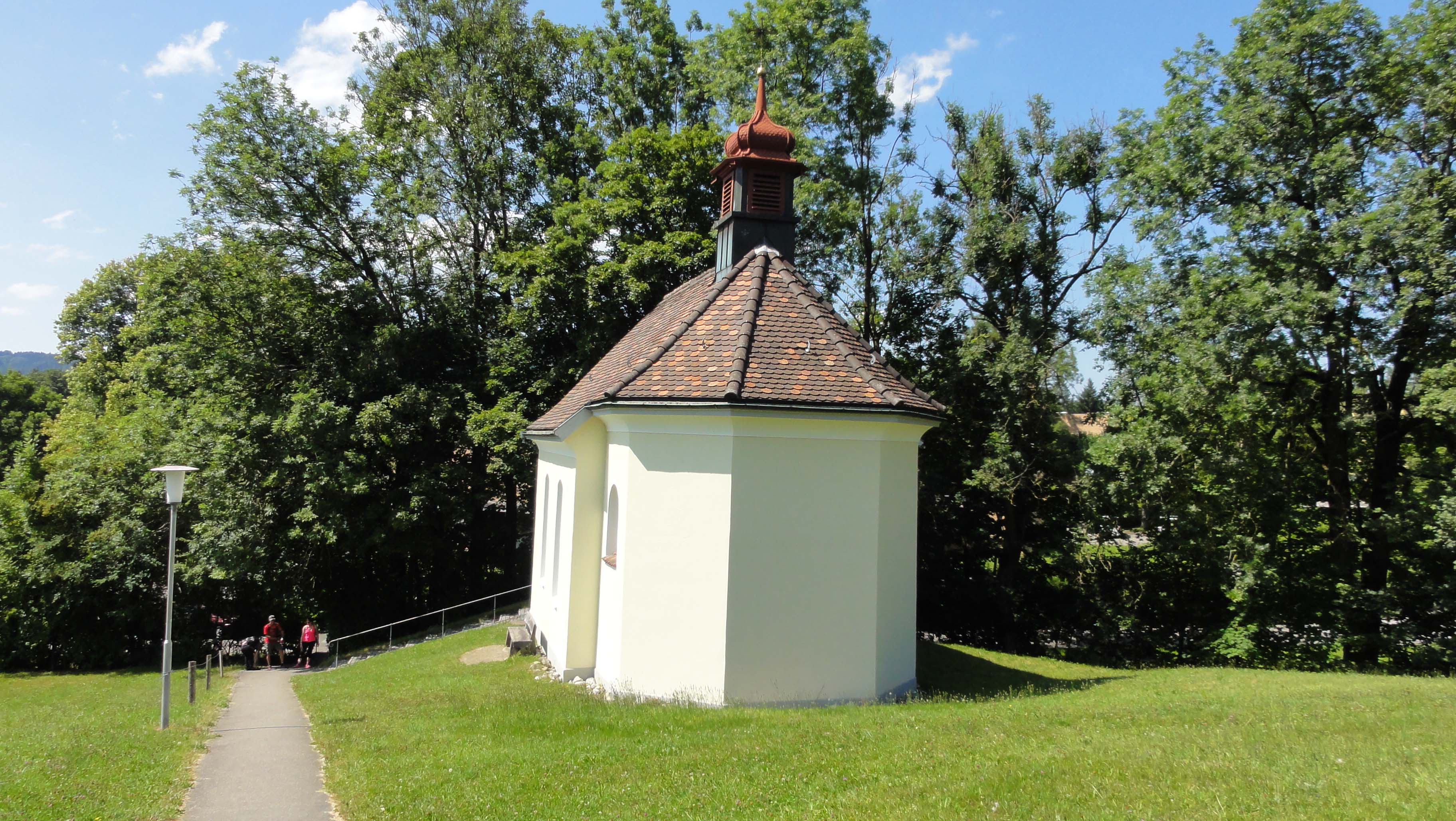 Kapelle Maria Einsiedeln, St. Gallen